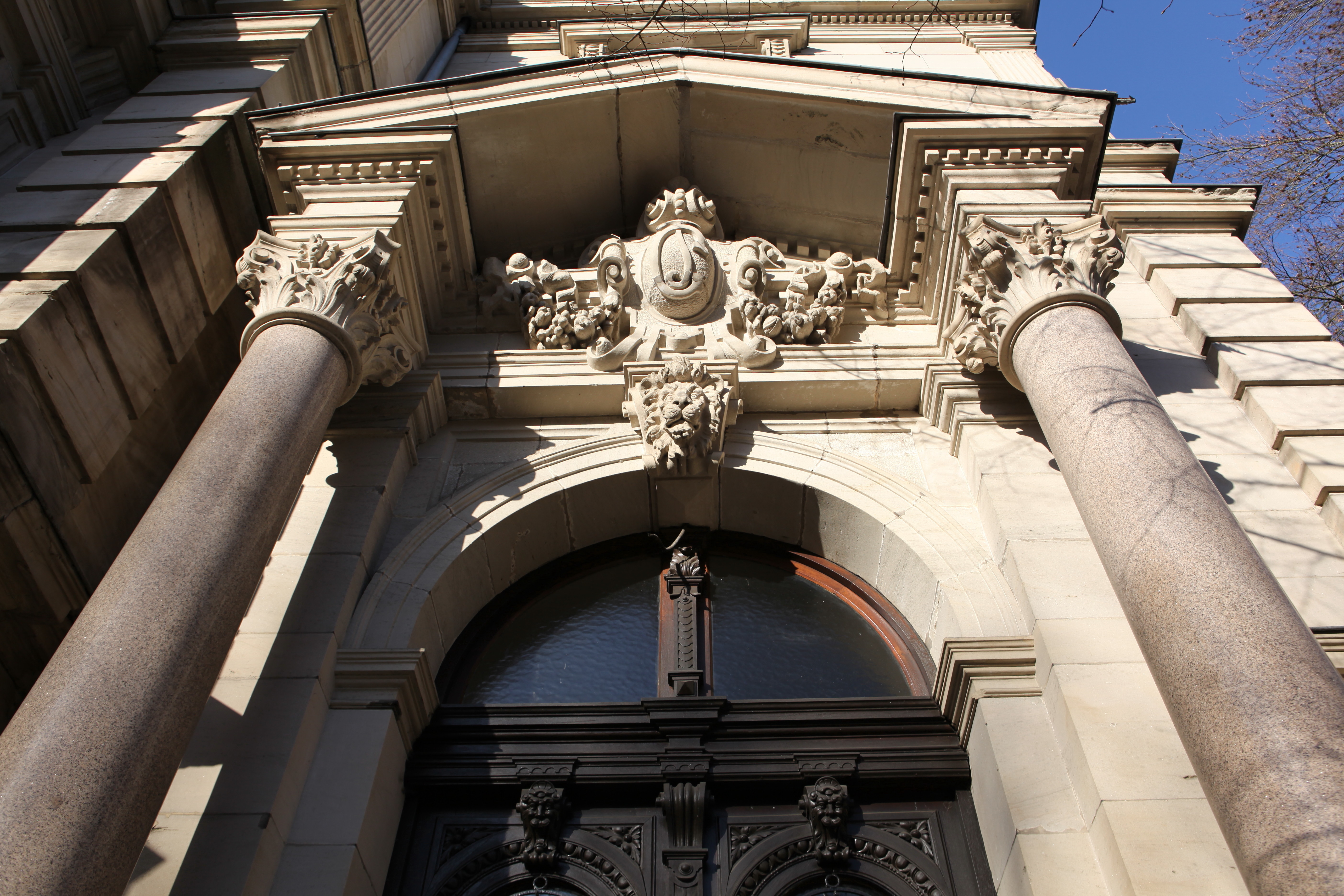 Eingangsportal, Ernstplatz 8 in Coburg